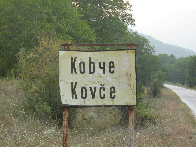 Табела на село Ковче, Поречие, Република Македония.